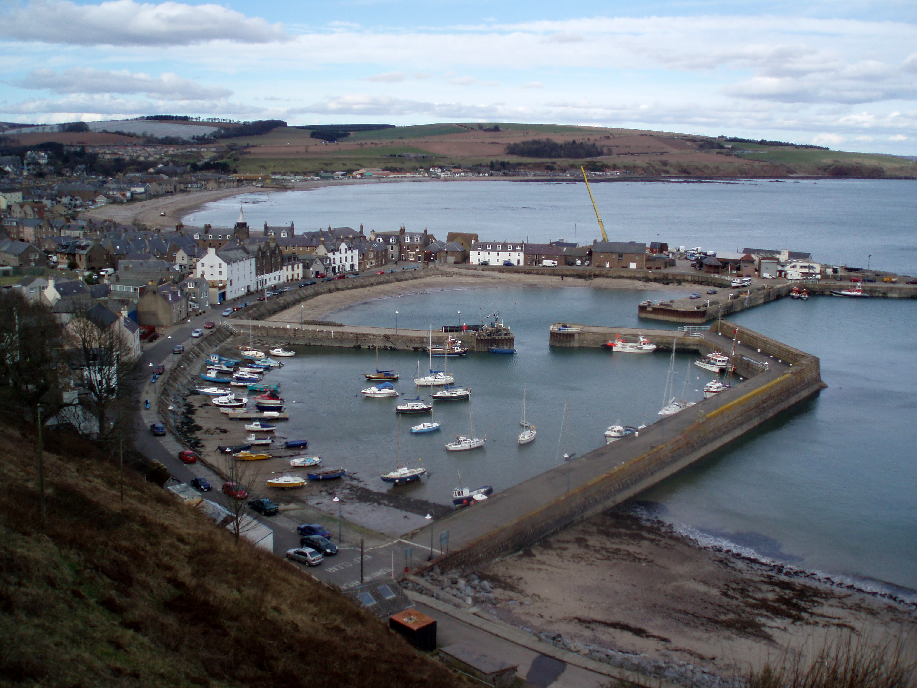 De haven van Stonehaven bij eb op een zonige dag in maart.